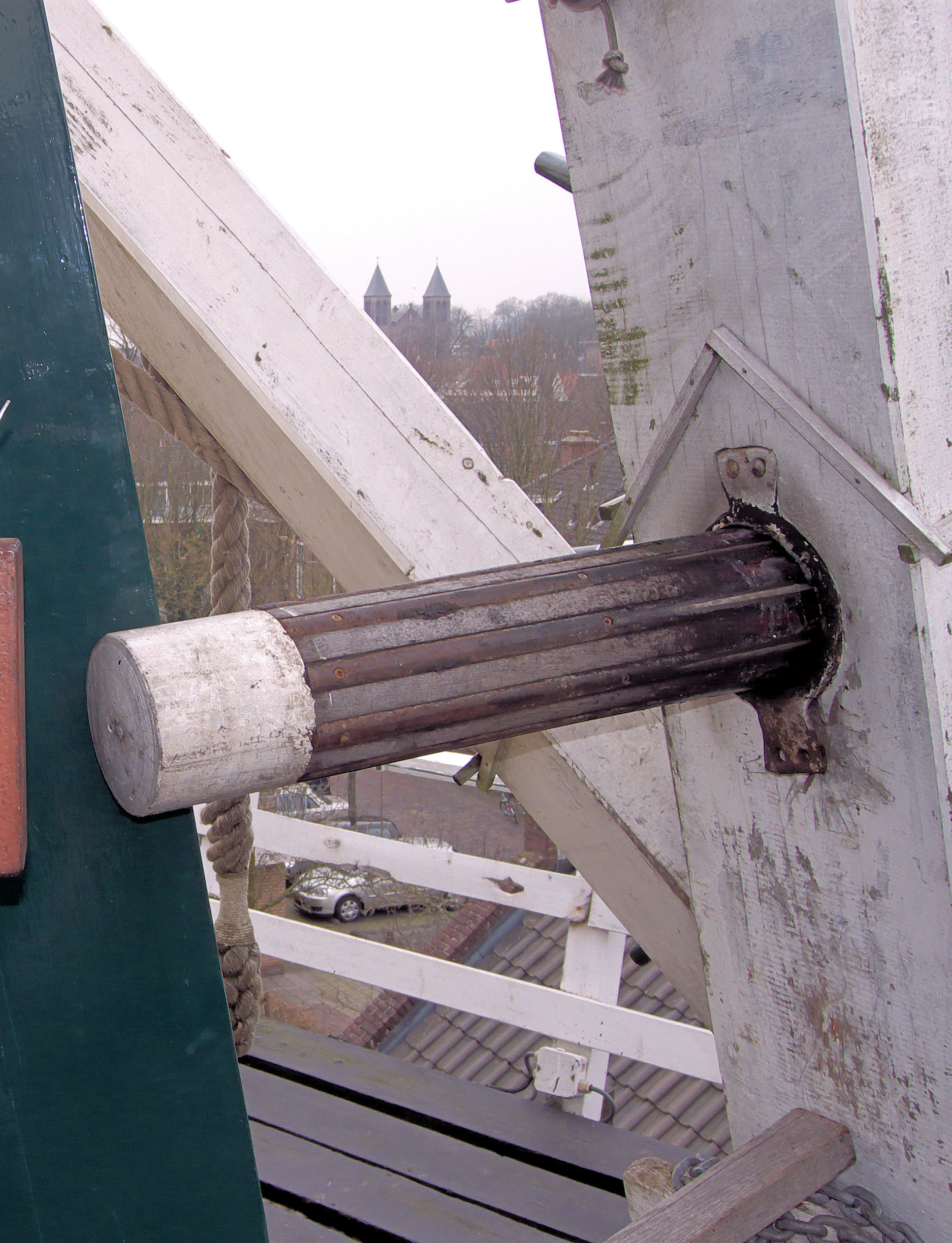 Molen De Kroon Arnhem kruiwie